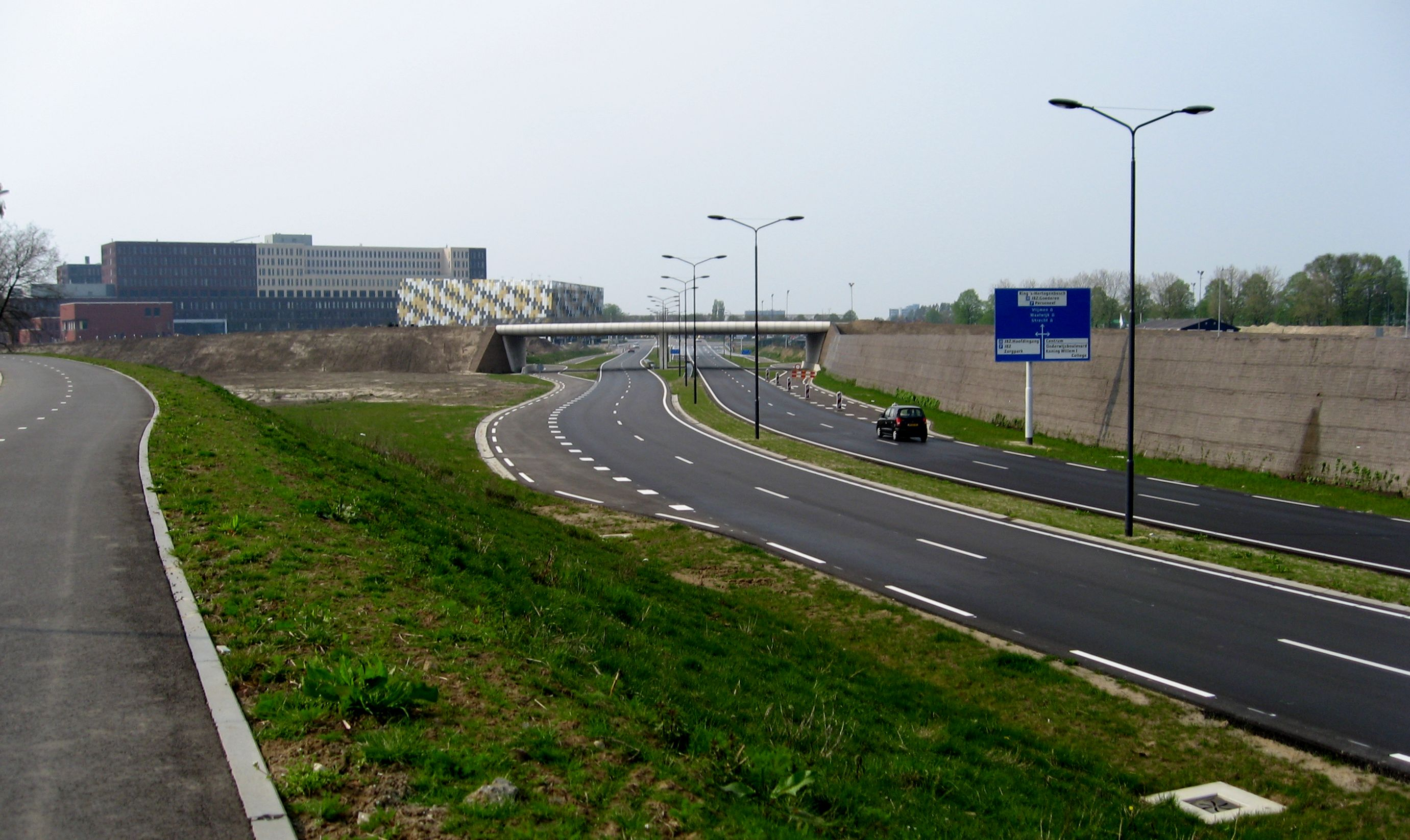 Randweg in 's-Hertogenbosch met in aanbouw zijnde Willemspoort viaduct en het nieuwe Jeroen Bosch Ziekenhuis.